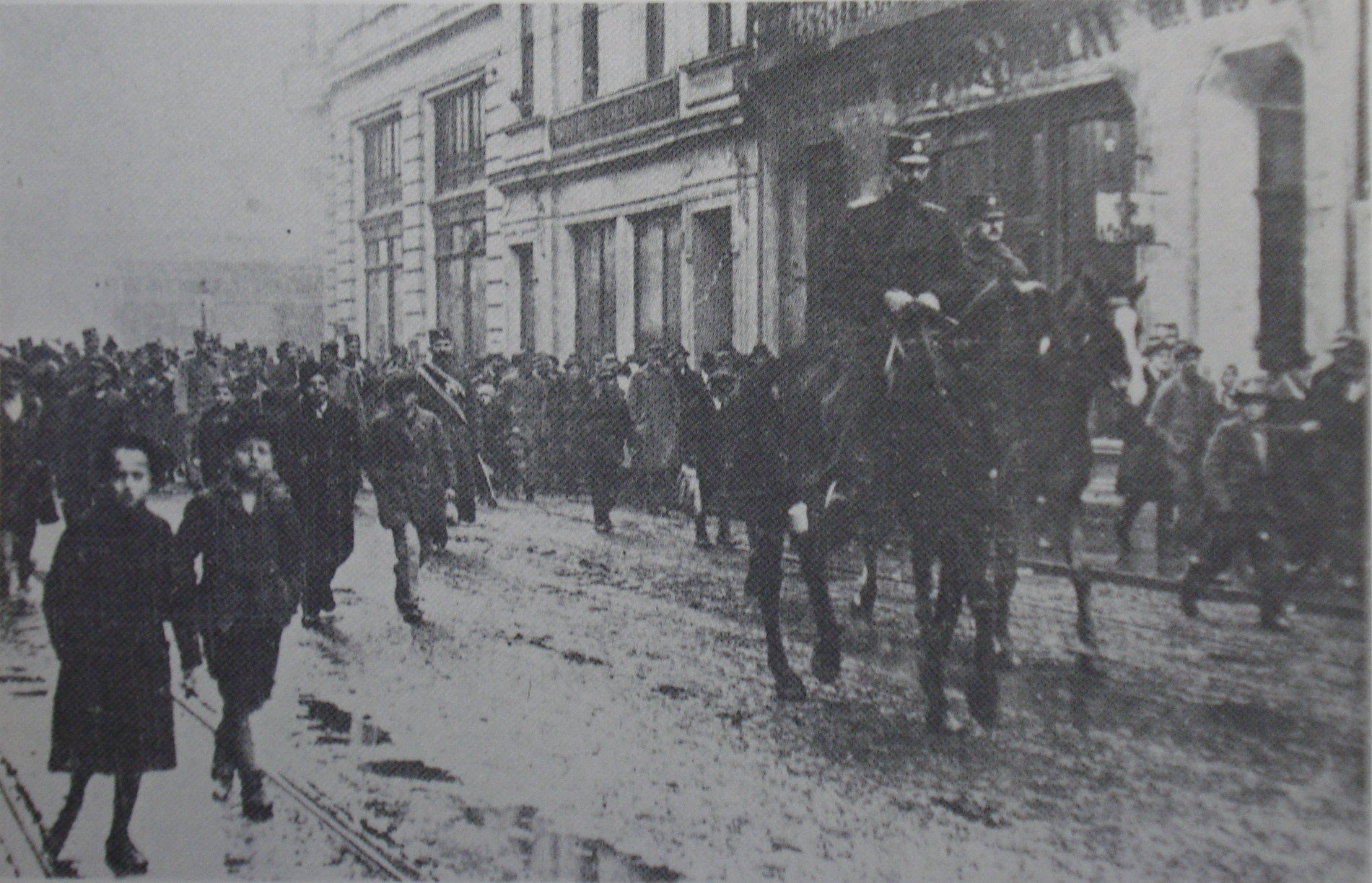 Jedinice 7. pp Dunavske divizije odlaze u kasarne u Ilici nakon svečanog dočeka u središtu Zagreba, studeni 1918